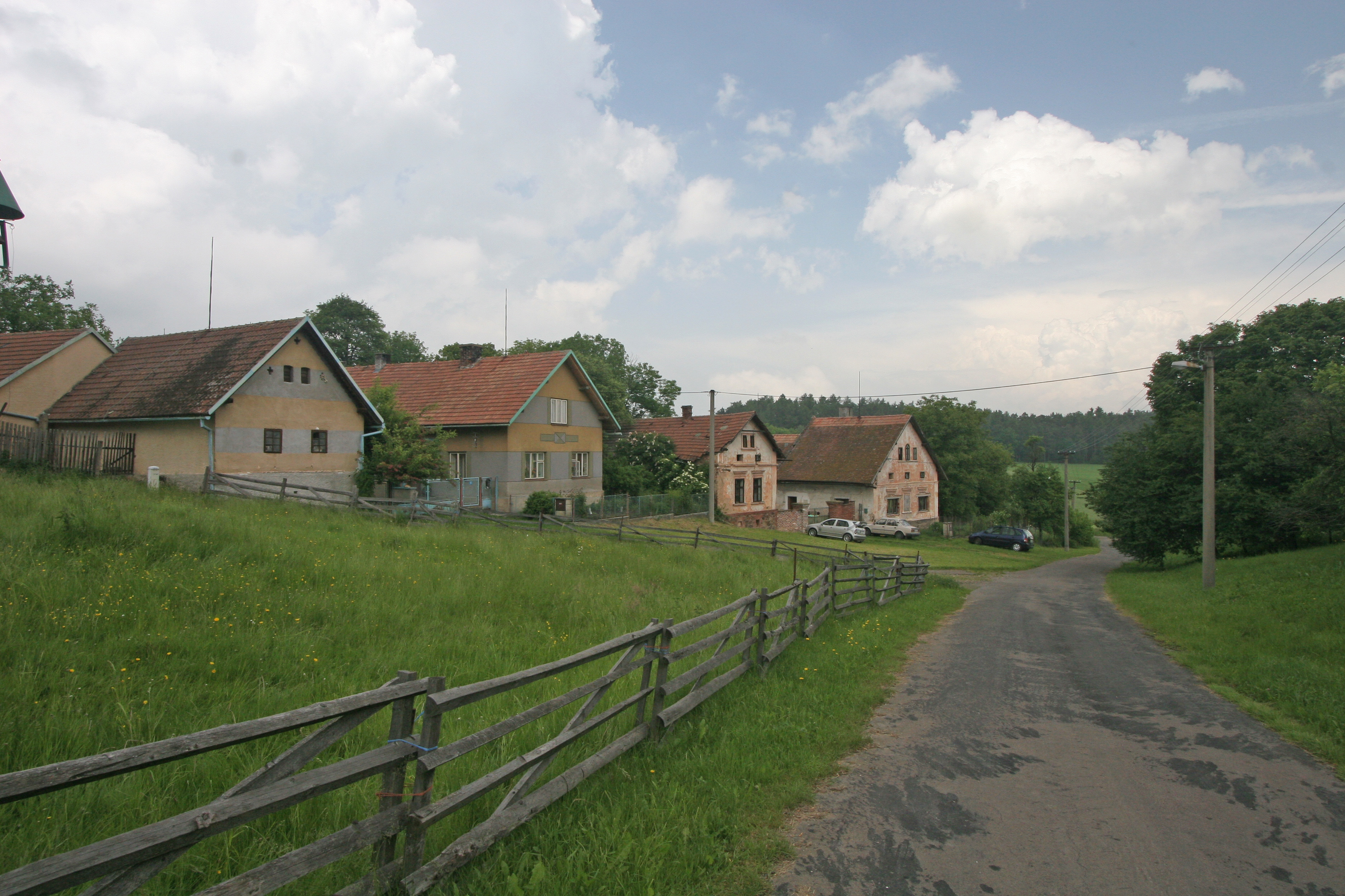 Petříkovice náves